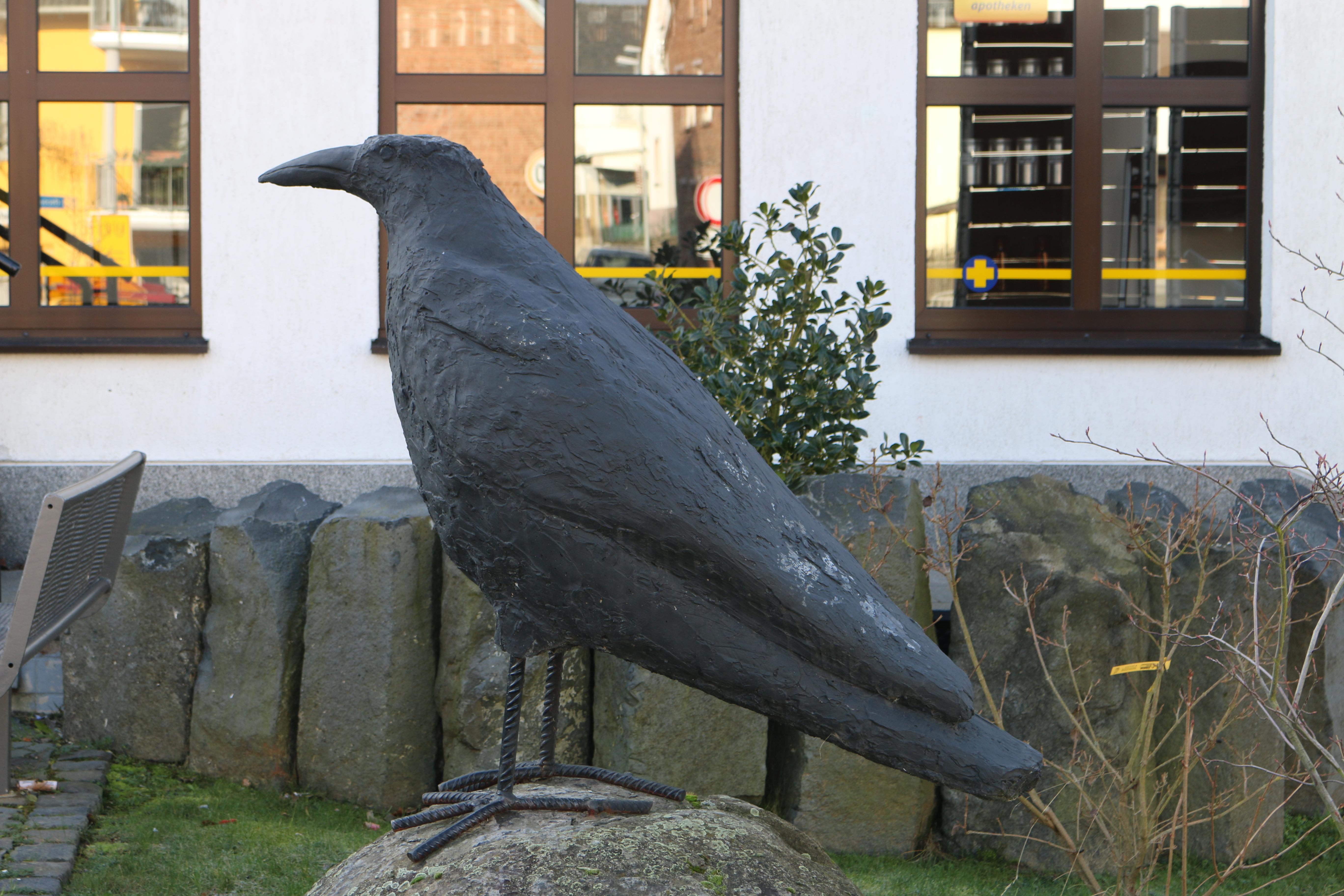 Hintermeilingen: Denkmal des Hintermeilinger Rabe